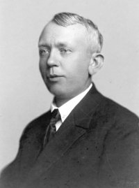 Karel Rychlík (1885-1968)